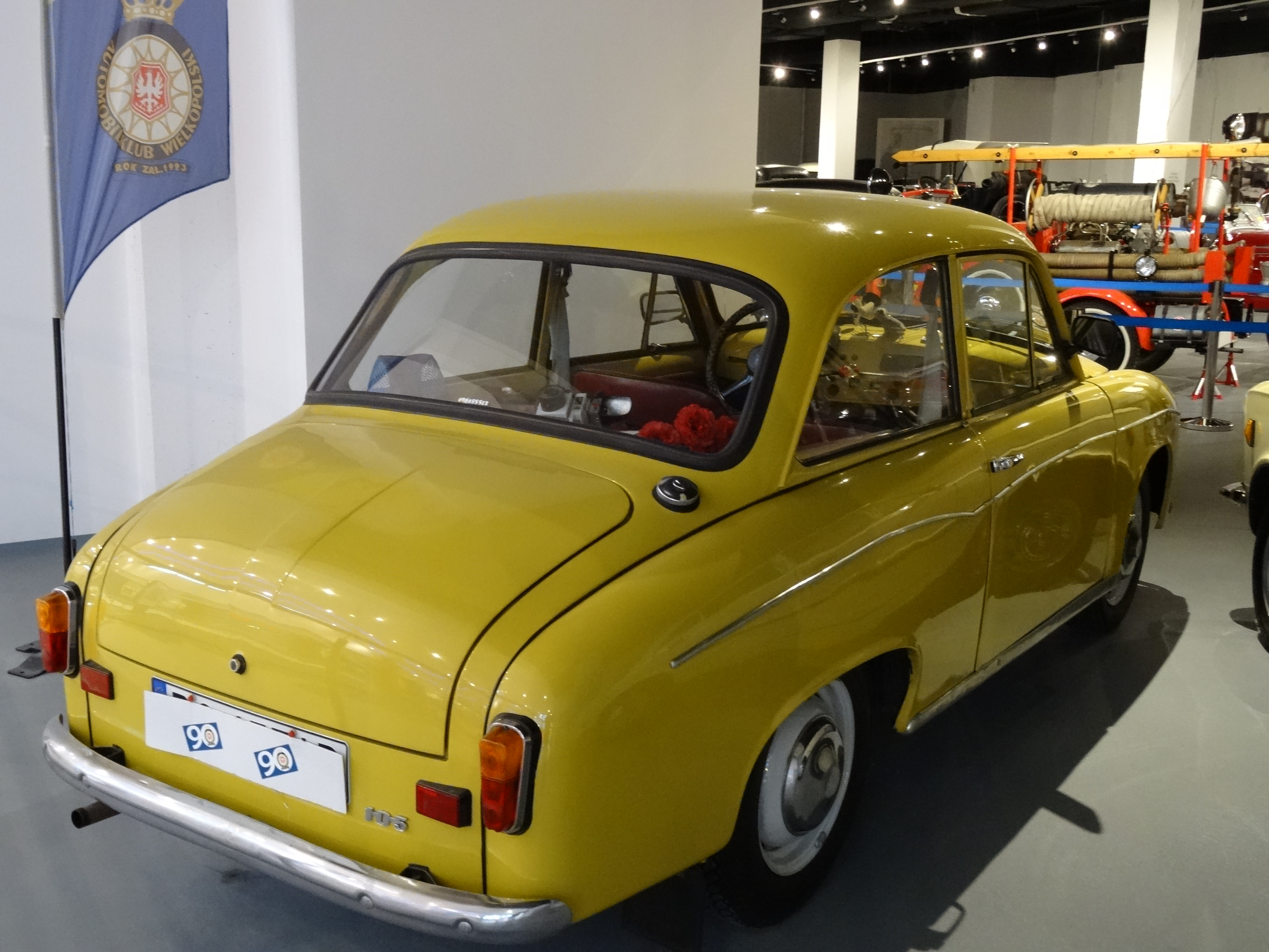 Syrena 105, Polska, 1977 r.